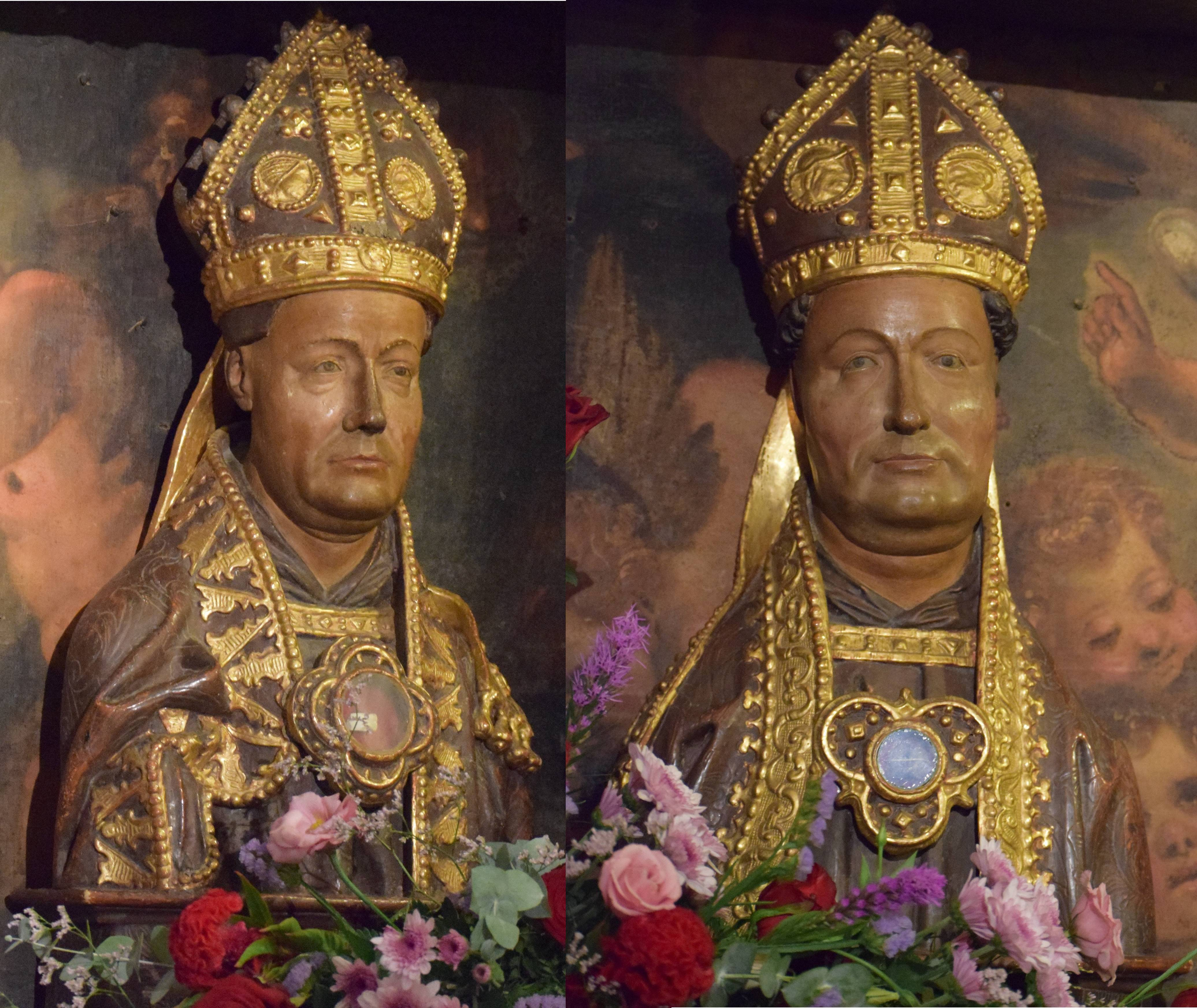 Relicarios del séquito de Santa Úrsula y las Once Mil Vírgenes, Sanlúcar de Barrameda, Santuario Basílica Virgen de la Caridad, 1520-1530, regalo del Emperador Carlos V al VI duque de Medina Sidonia